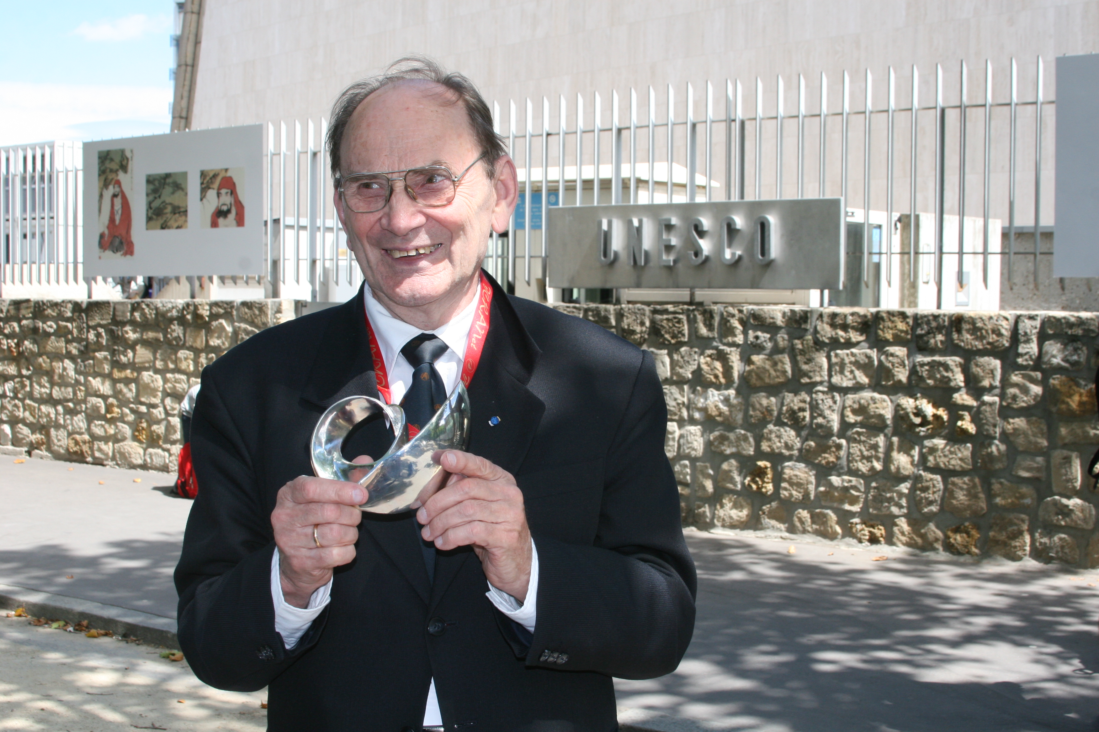 Akadeemik Jaan Einastole anti 13. juulil 2009 UNESCO peakorteris väärikas Marcel Grossmanni auhind. Fotograaf: Peter Murdmaa